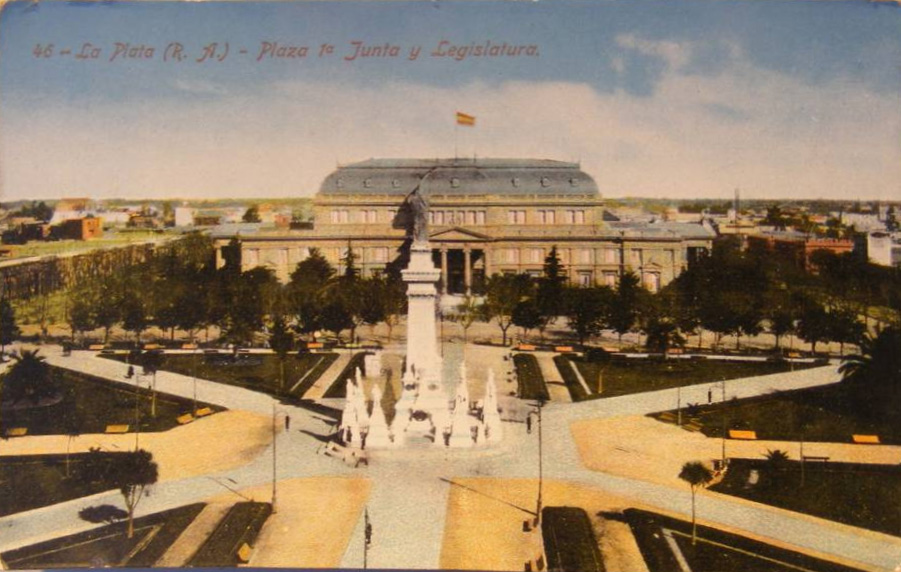 Plaza Primera Junta en La Plata, con el monumento que la dominaba originalente, luego demolido. Al fondo, el Palacio de la Legislatura de la Provincia de Buenos Aires.